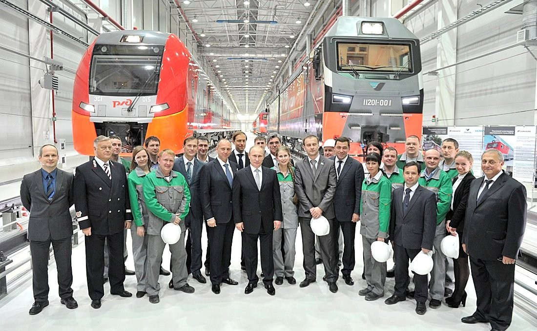 Электропоезд ЭС1-015 и электровоз 2ЭС7-001 (11201) на заводе во время посещения В.В. Путиным предприятия «Уральские локомотивы». За 2ЭС7 вдали видны электровозы 2ЭС10 и 2ЭС6.